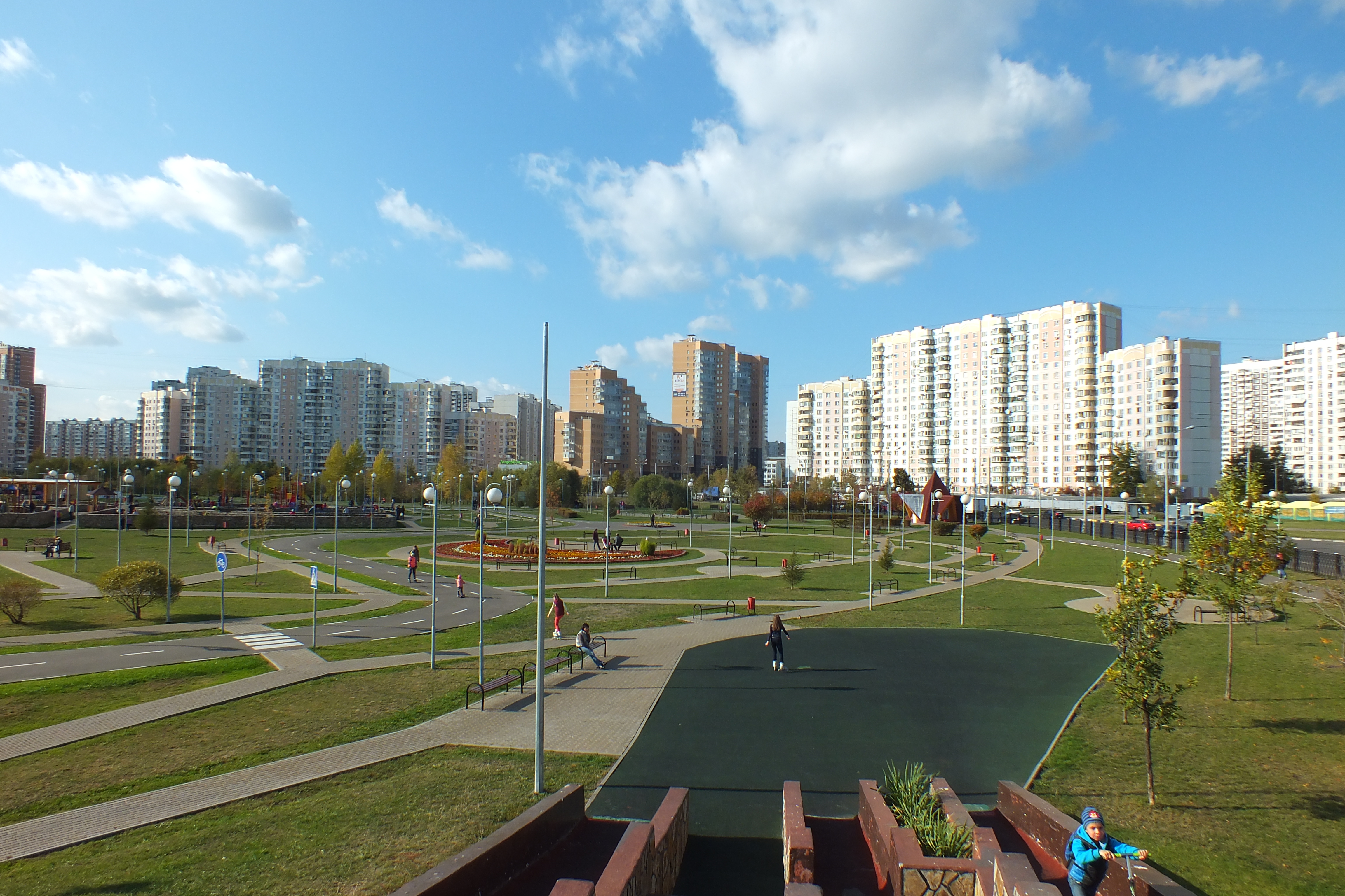 Парк имени Артёма Боровика в Москве, в районе Марьино